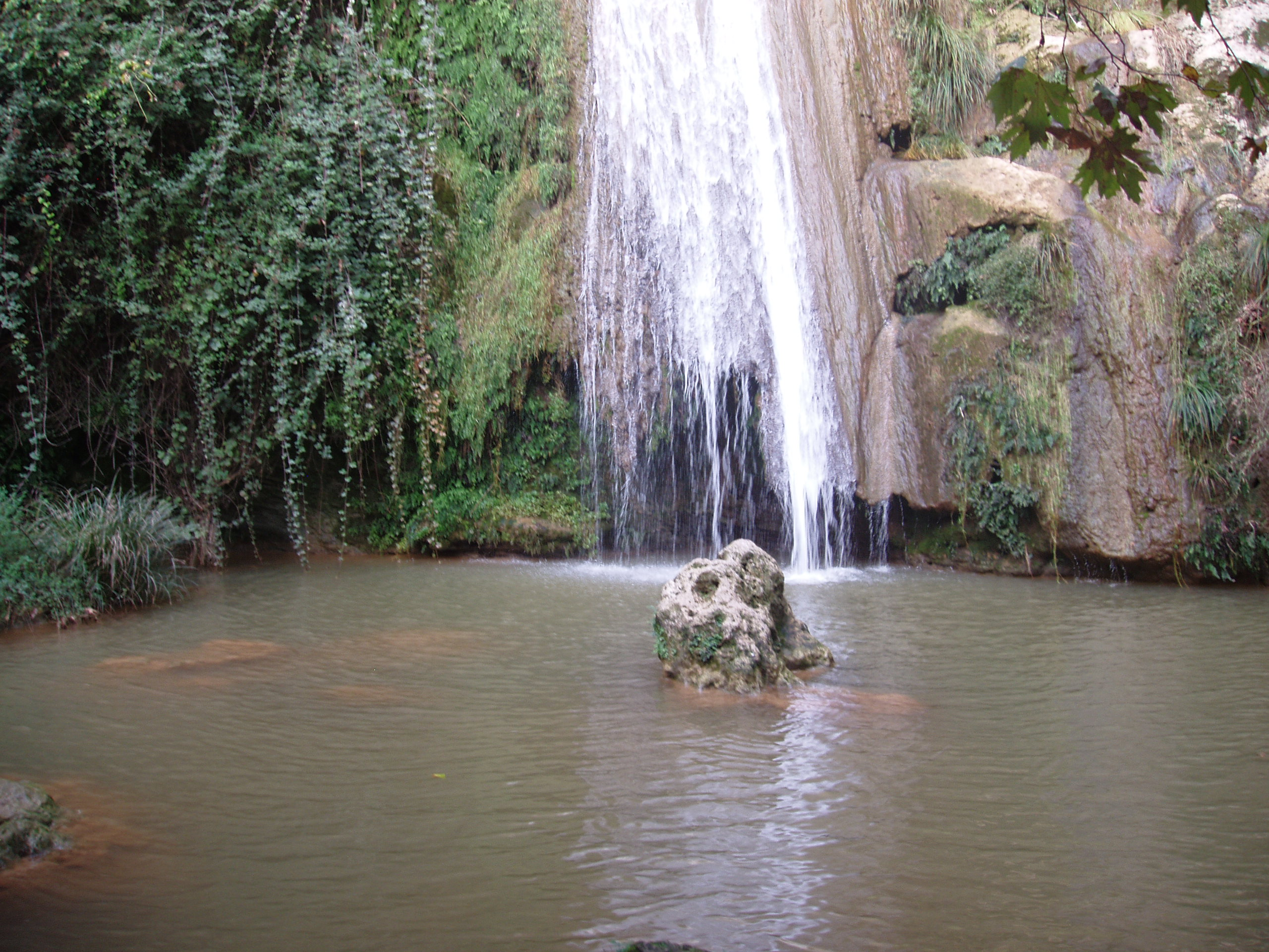 Wasserfall "Kalamari Katarakt" bei Gialova, Griechenland